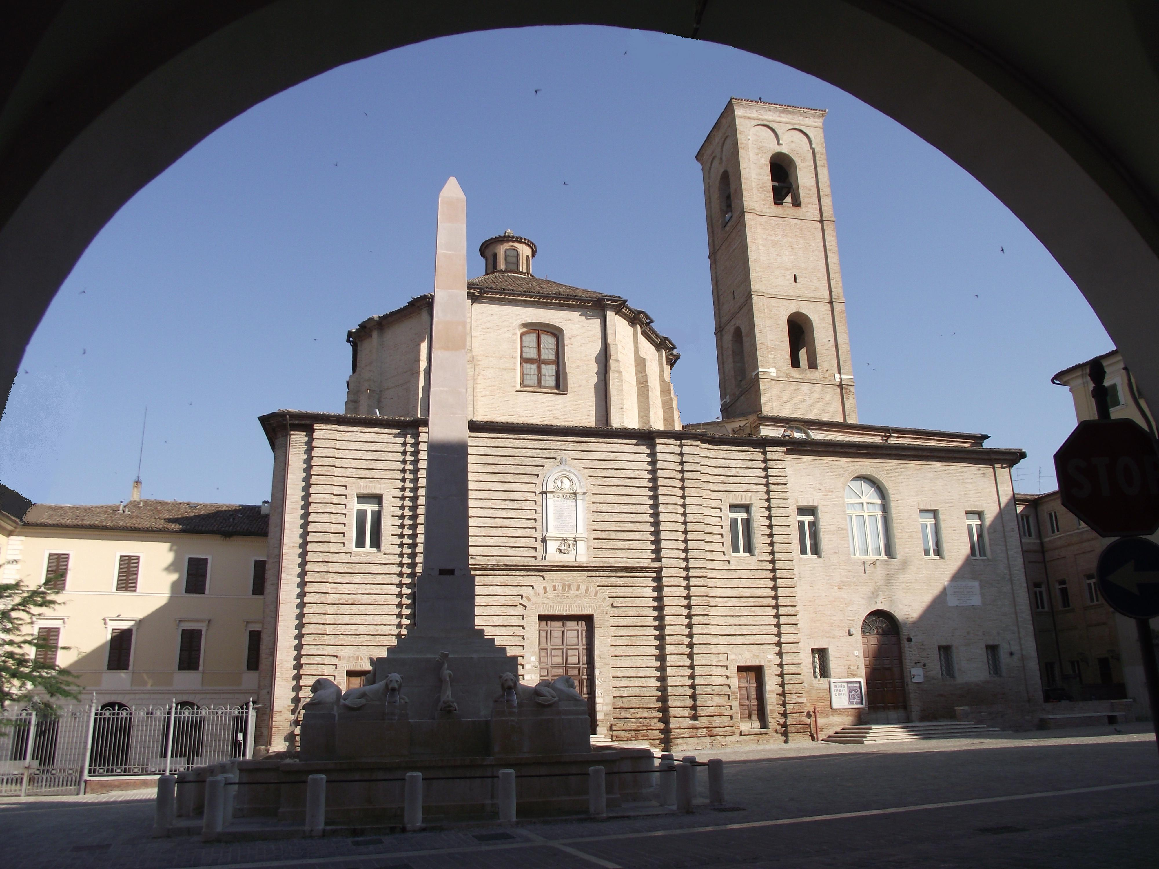 Jesi, Piazza Federico II, Chiesa di S.Floriano, XVIII secolo